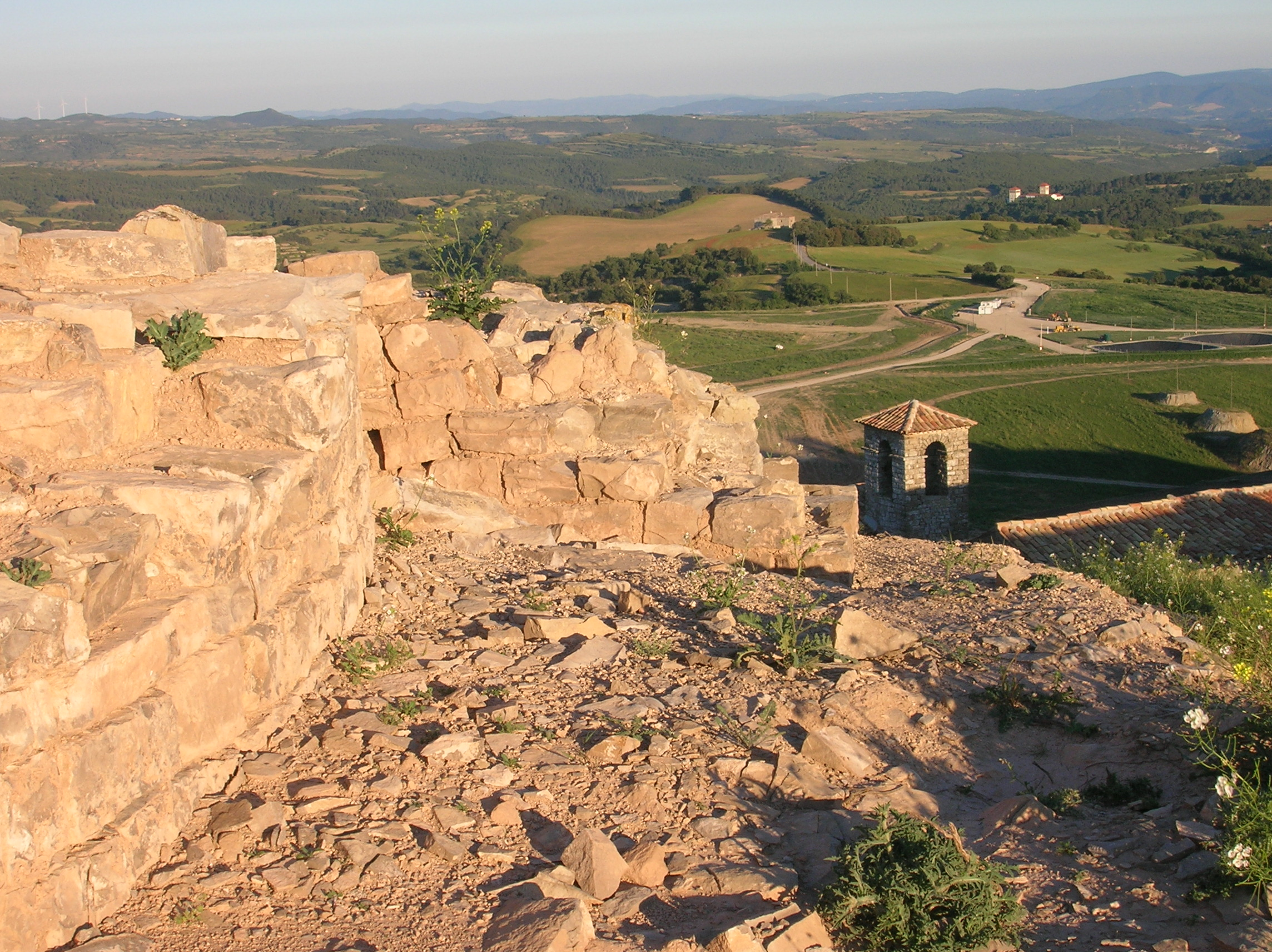 Runes del Castell i campanar de l'Esglèsia. Maig 2010